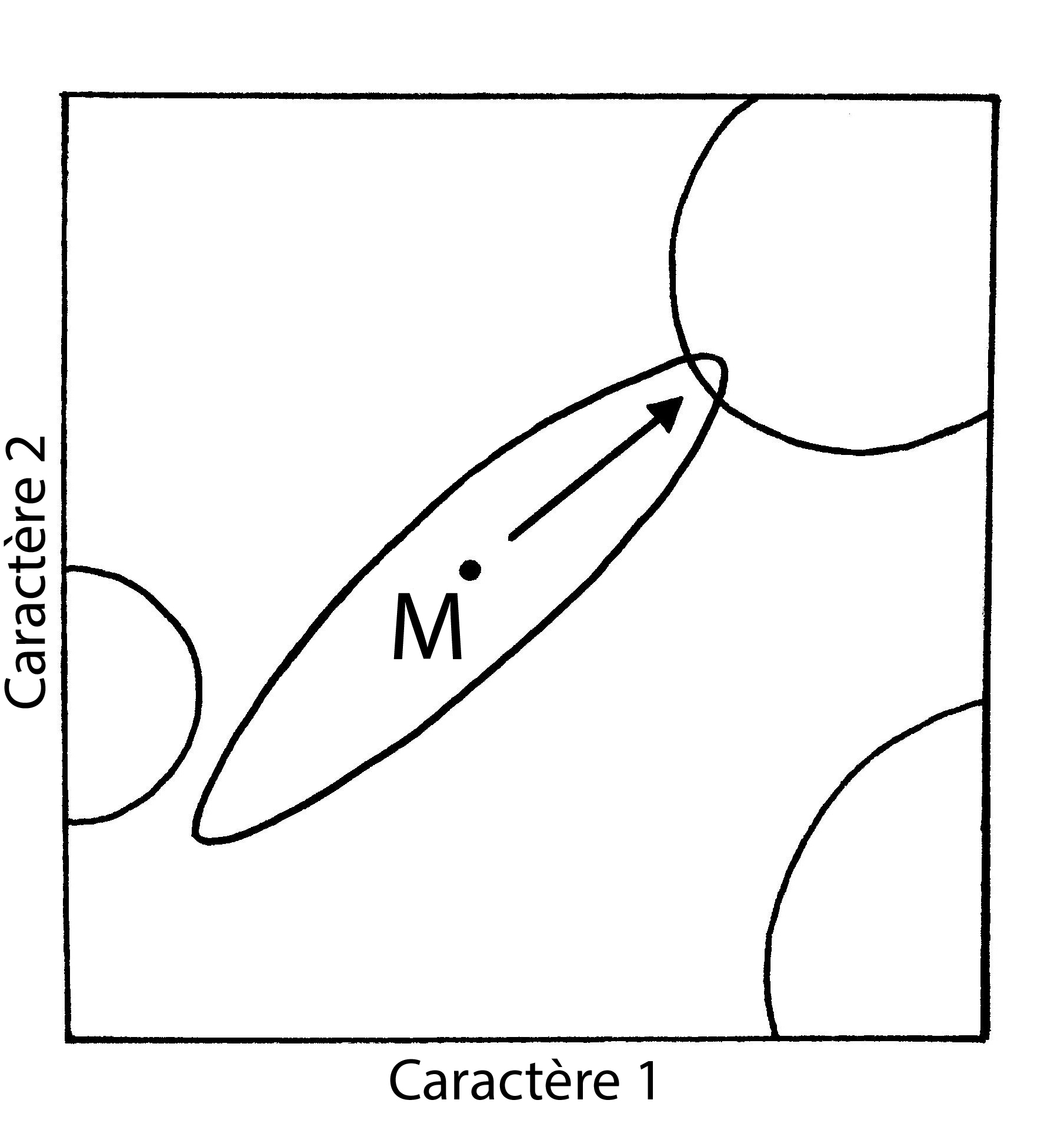 Les caractères 1 et 2 évoluent dans un paysage adaptatif en présence d'un biais de développement. Il y a corrélation de caractère.